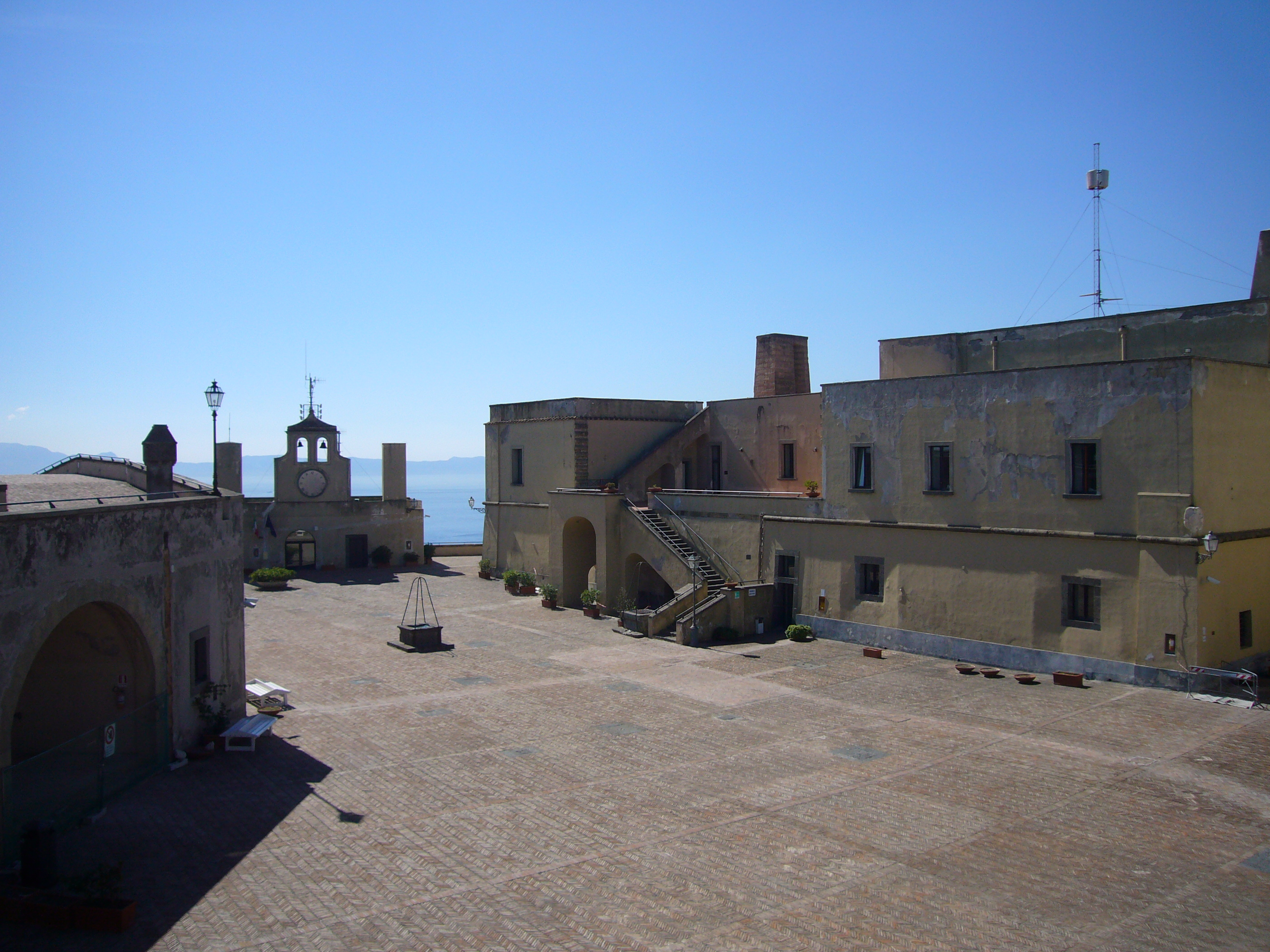 Napoli, Castel Sant'Elmo: piazza d'armi e la chiesa dal camminamento